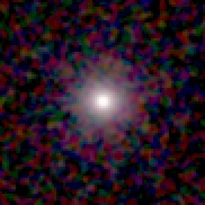 Galaxy NGC 75